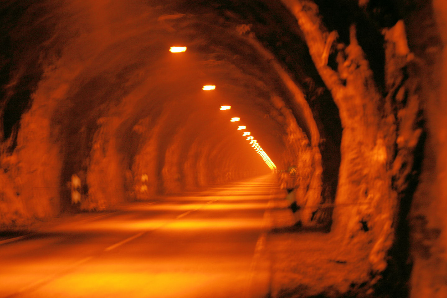 Frafjordtunnelen